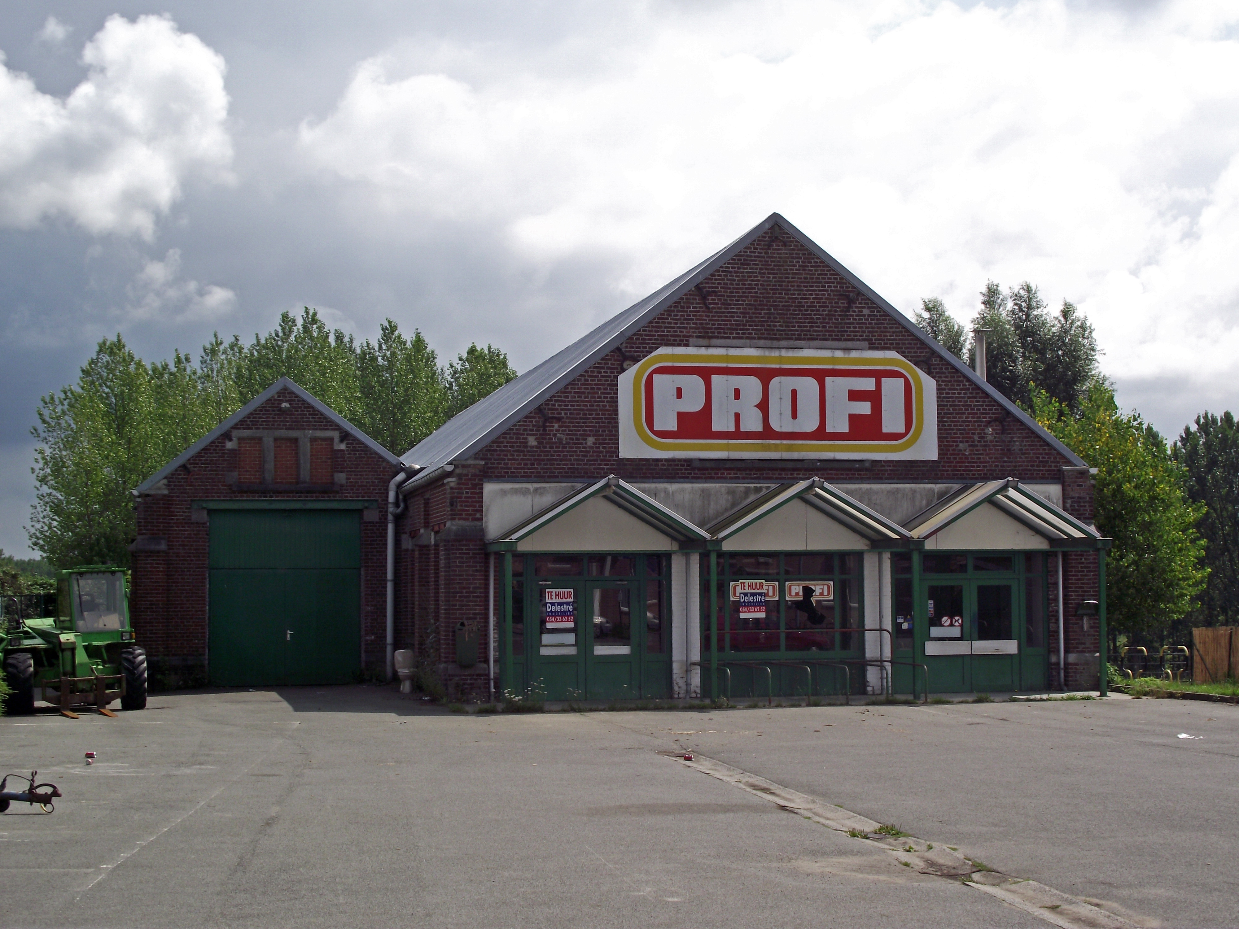 De vroegere buurtspoorwegstelplaats van Herzele, die als Profi supermarkt ingericht is. De supermarkt is echter ook al gesloten.